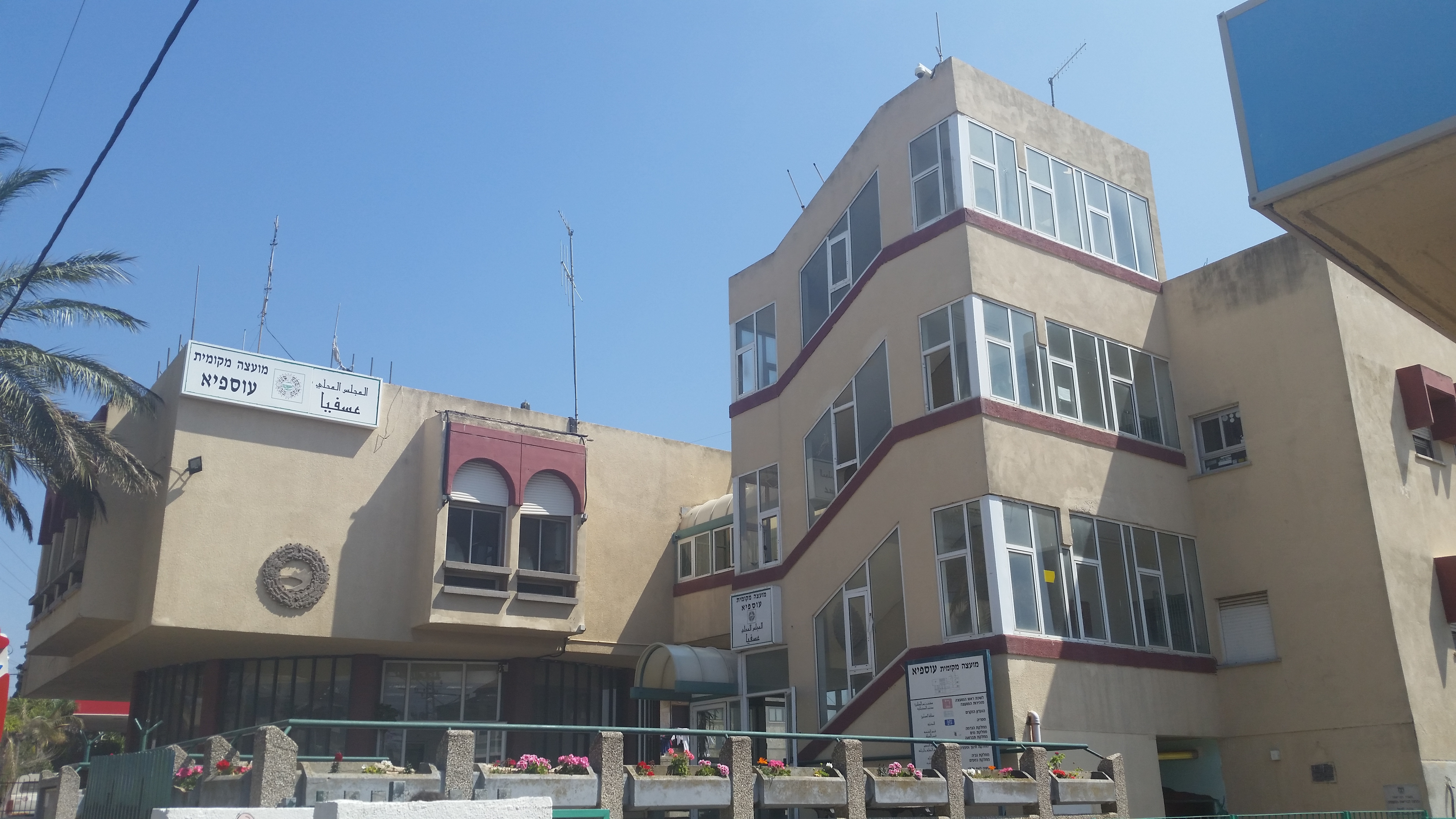 בנין המועצה המקומית של עוספיא